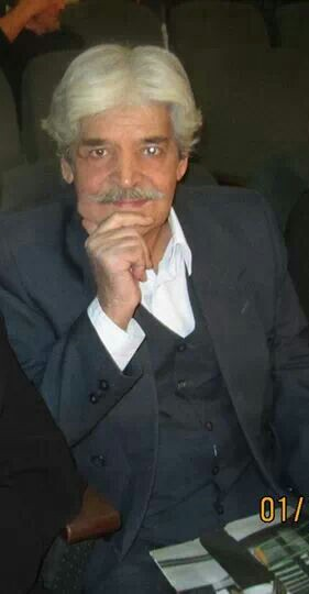 صادق صندوقی در سینما فلسطین در سال ۱۳۹۲